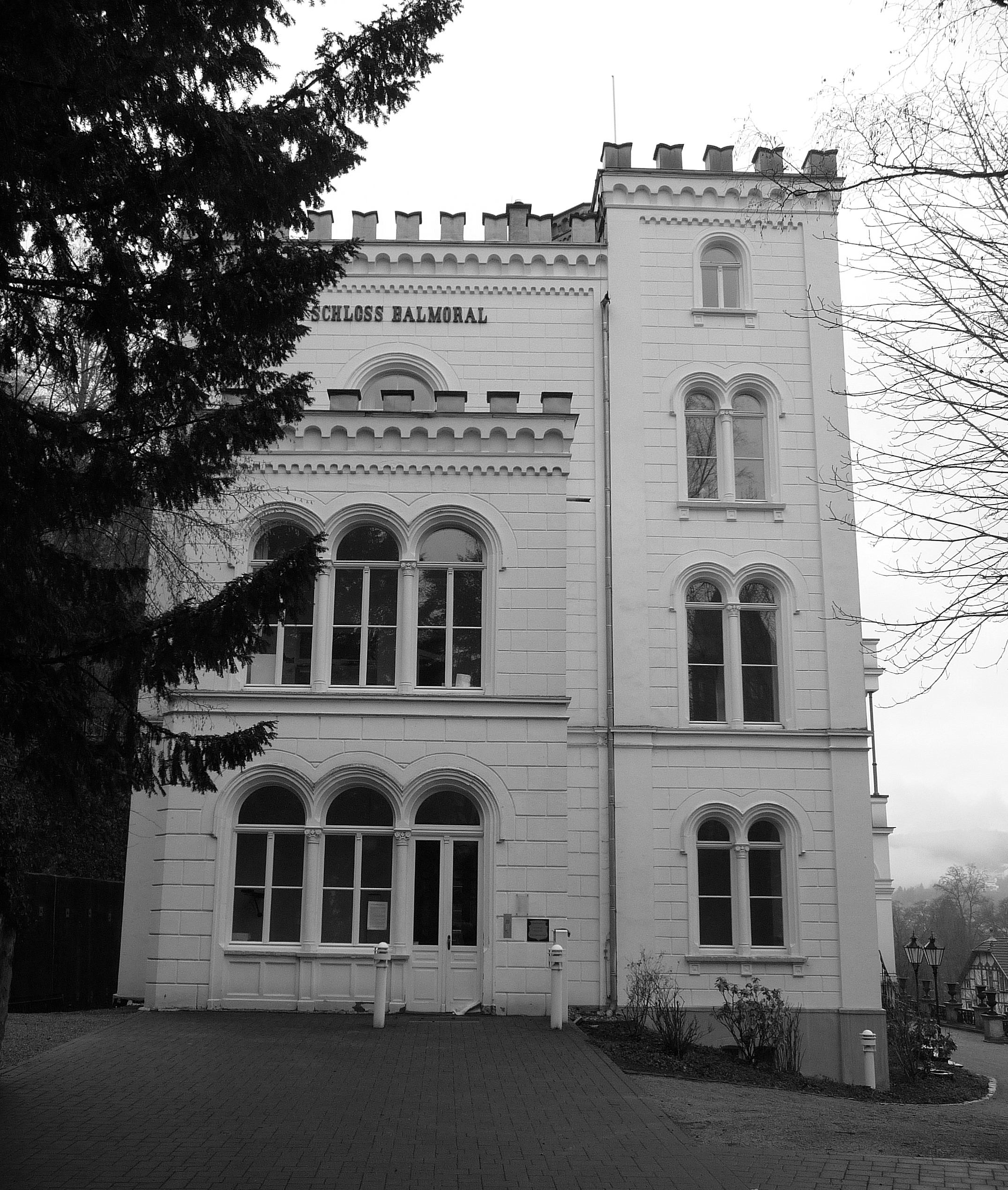 Schloss Balmoral in Bad Ems; 1868